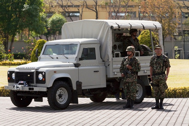 trasporte blindado de tropas